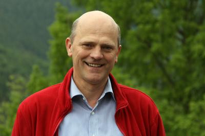 Prof. Dr. Harald Garcke in Oberwolfach 2015